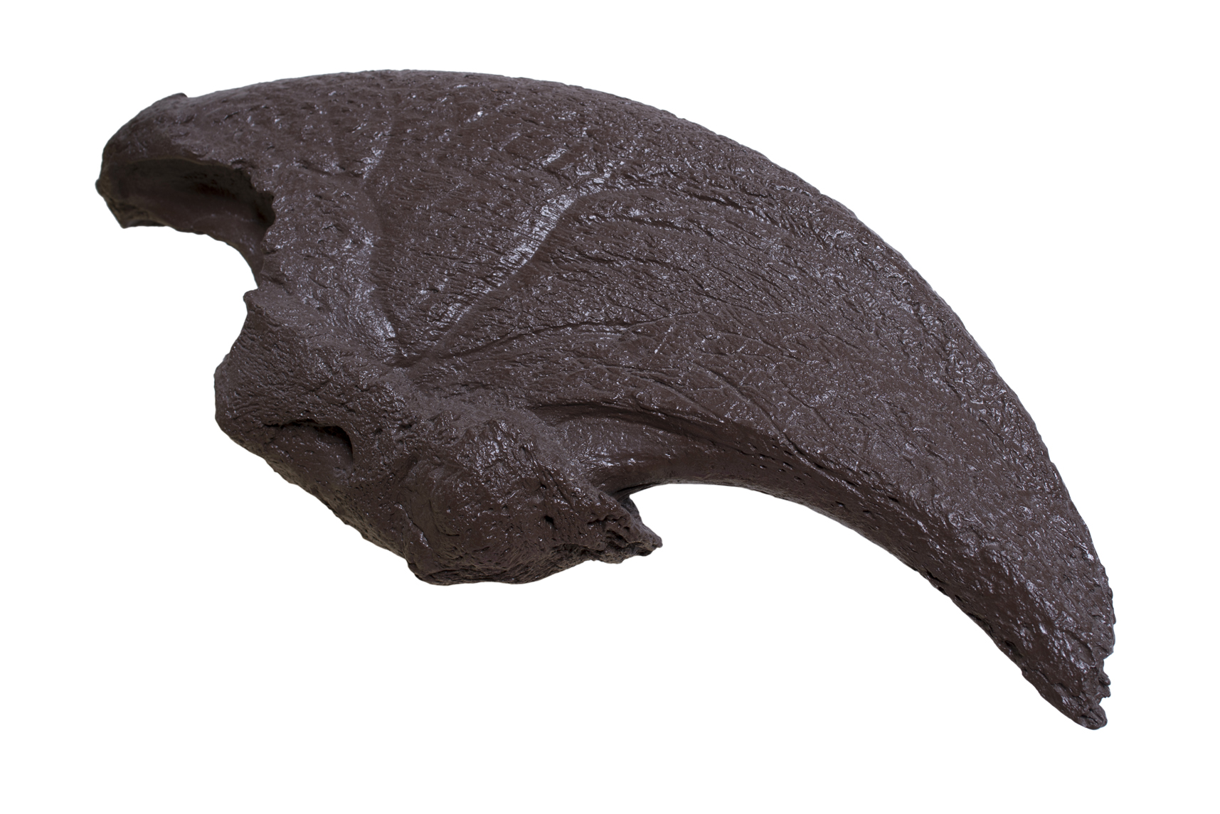 Artiglio. Replica.